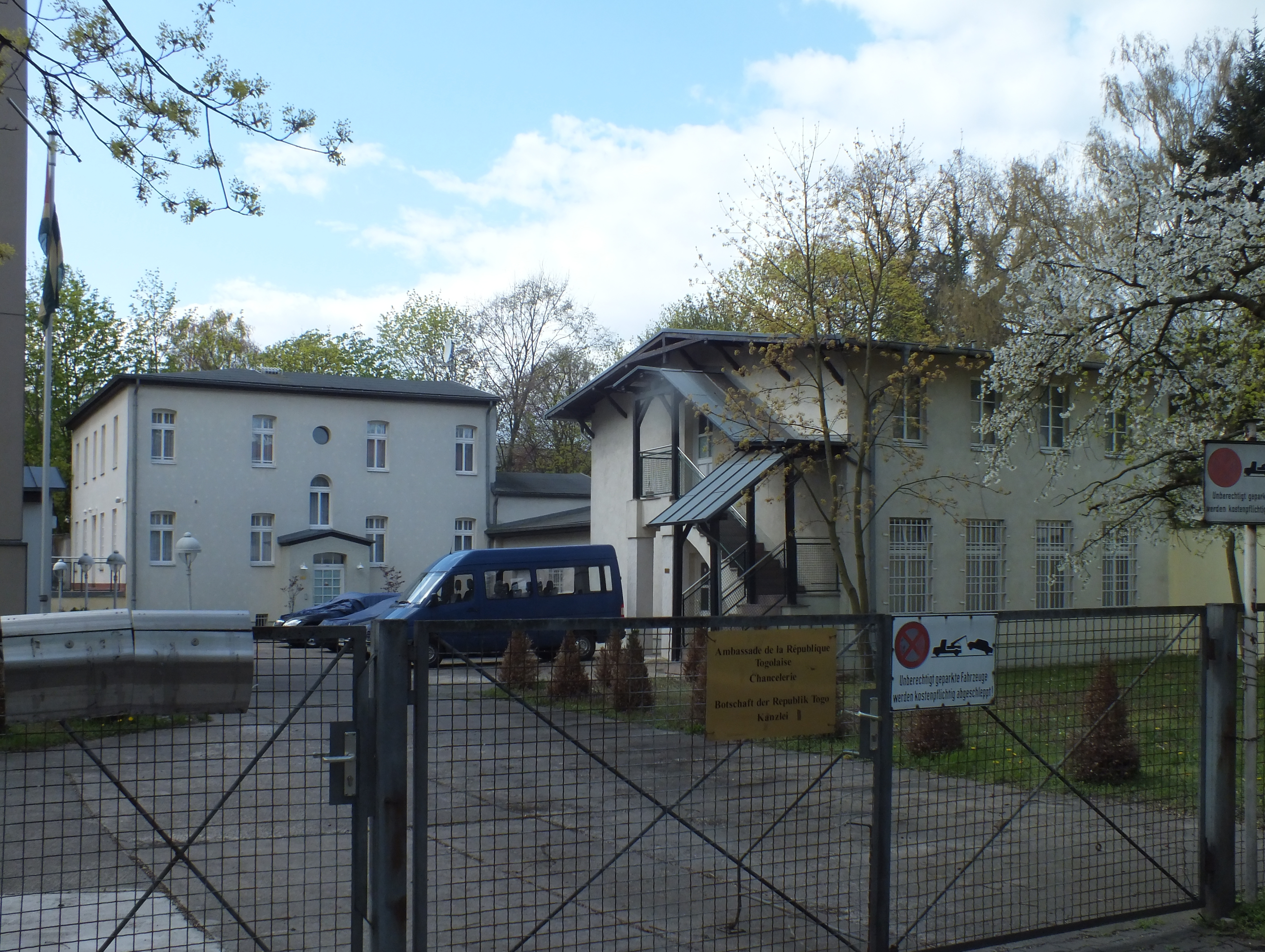 Baudenkmal aus dem Ensemble eh. Fr.-Fröbel-Haus, Haus Nummer 43a